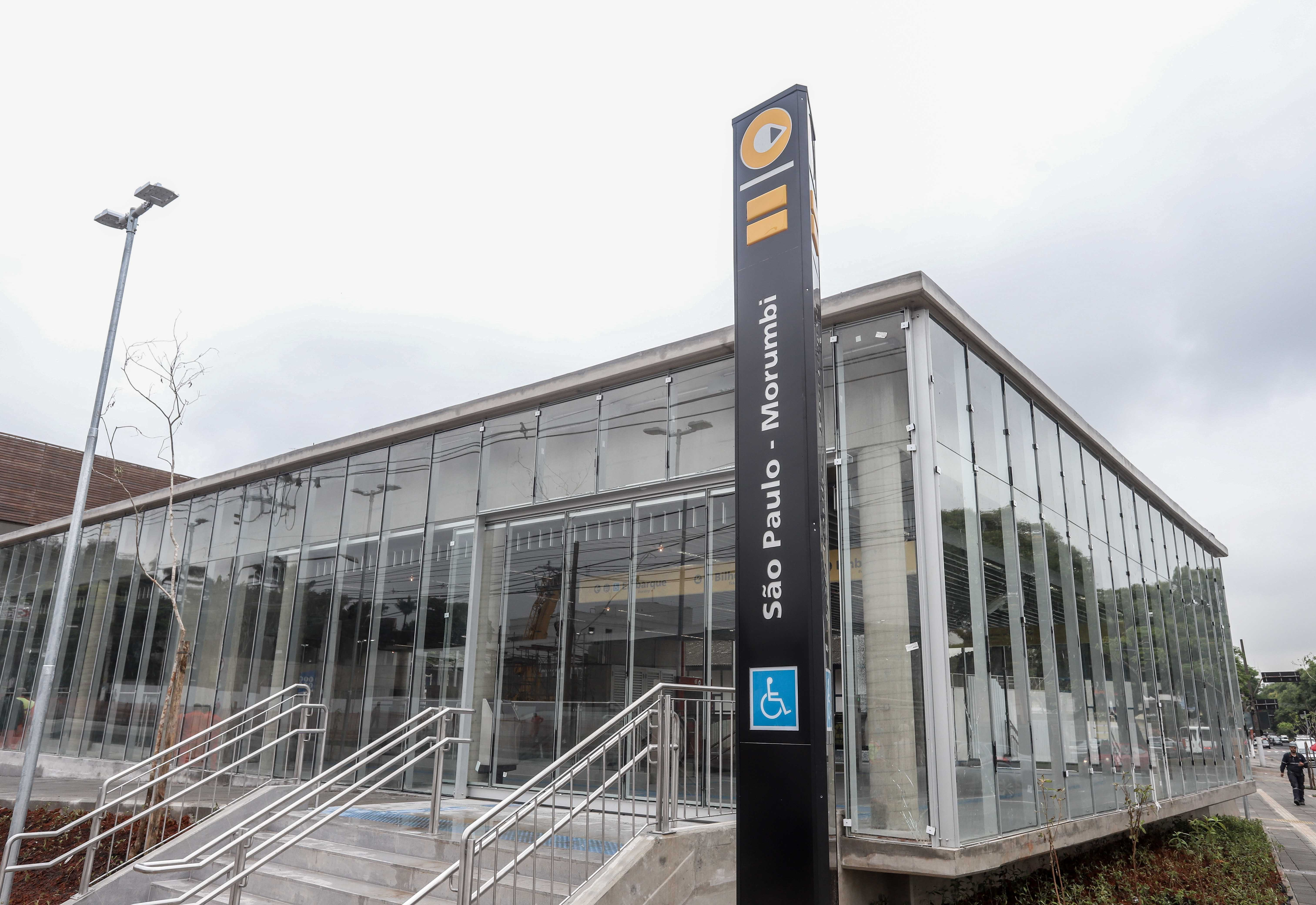 O governador do Estado de São Paulo, Márcio França, participa de visita técnica às obras da estação São Paulo-Morumbi da linha 4-Amarela. Local: São Paulo/SP Data: 26/10/2018 Foto: Governo do Estado de São Paulo